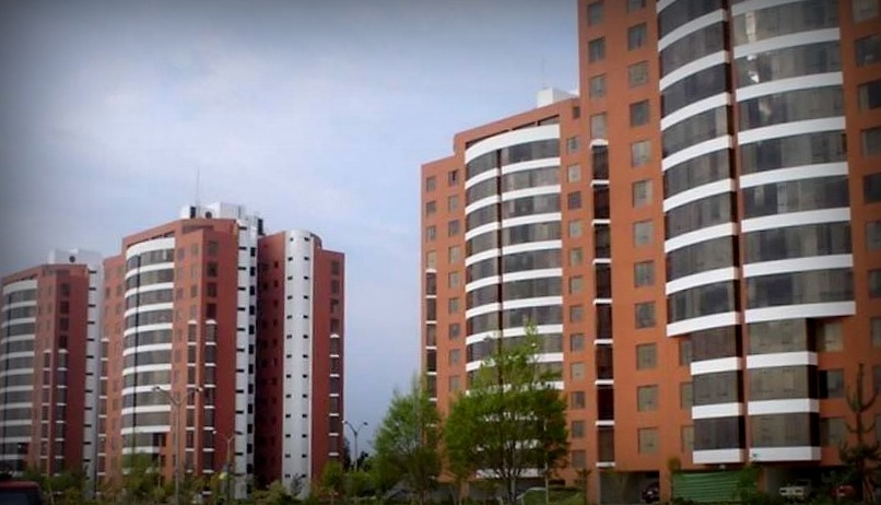 Torres de la villa médica en Jose Luis Bustamante y Rivero, Arequipa, Peru